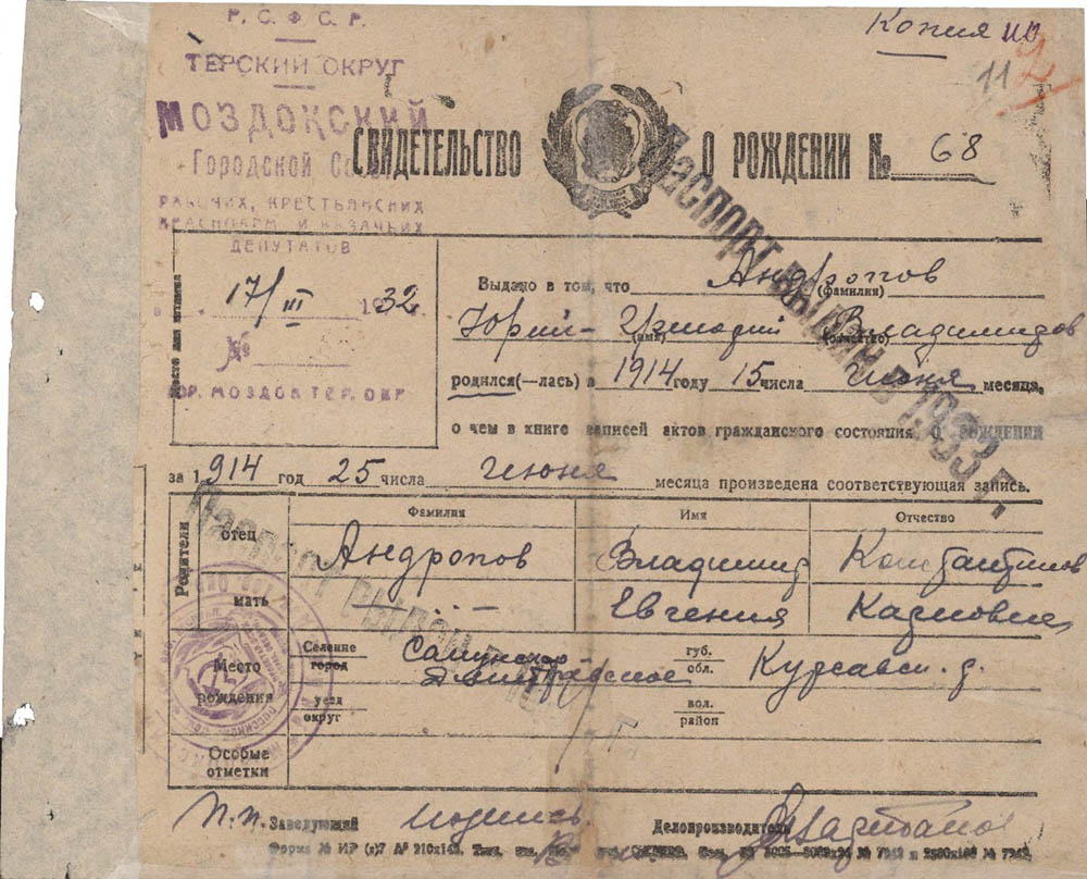 Андропов Юрий Владимирович, Свидетельство о рождении